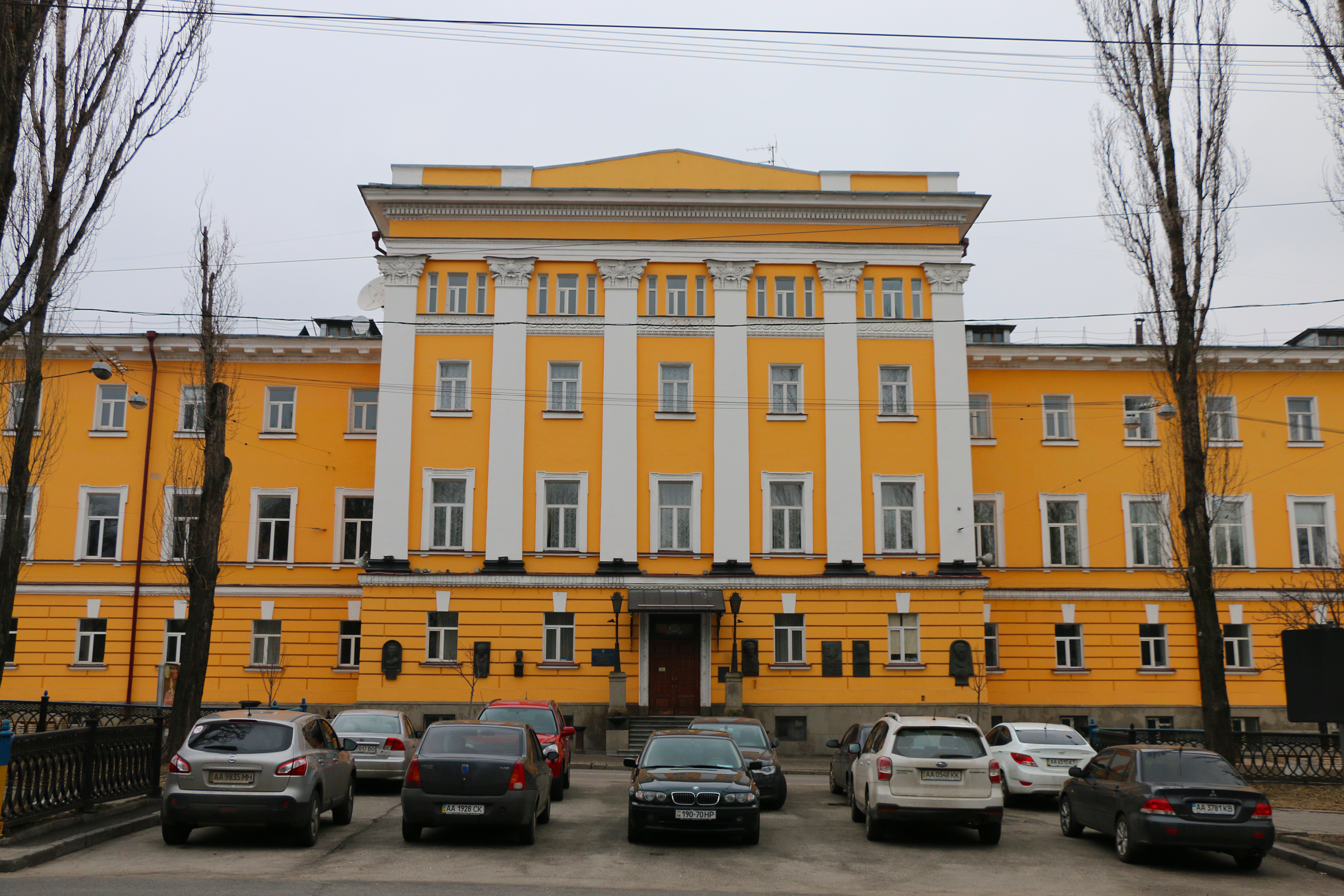 Будинок 1-ї чоловічої гімназії, в якій у різні роки навчались Драгоманов М. В., Булгаков М. О., Паустовський К. Г., письменники та ін.; жив та працював Пирогов М. Г., хірург; розміщувалися ген. секретаріат освіти, міністерство народної освіти УНР, Київ, Шевченка Тараса бульв., 14